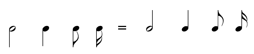 Description : Hampe des notes Source : Personnelle Licence : GFDL